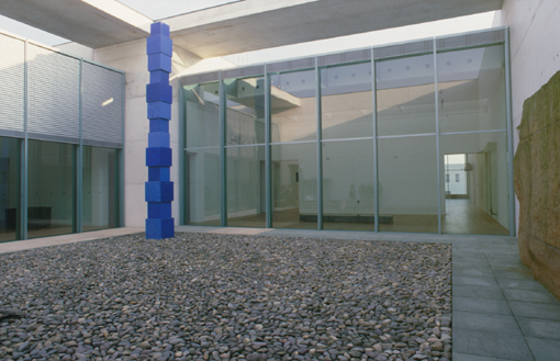 Jürgen Partenheimer, 'Weltachse', Kunstmuseum Bonn, 1998-2007 Kunstmuseum Bonn Native nameKunstmuseum BonnLocationBonnCoordinates50° 42′ 54.2″ N, 7° 07′ 15.7″ E Established1992Web page control : Q318859 VIAF: 145497348 ISNI: 0000 0001 2177 8733 LCCN: n81142342 GND: 2153289-8 SUDOC: 029984440 WorldCat institution QS:P195,Q318859